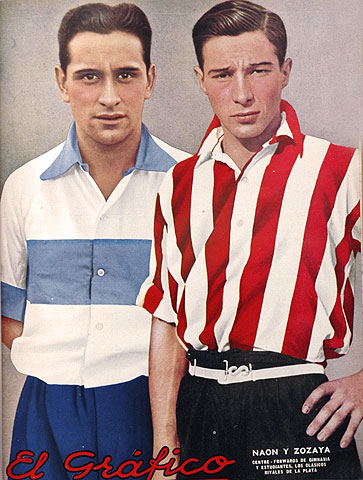 Naón y Zozaya, de Estudiantes y Gimnasia, respectivamente, en una tapa de la revista "El Gráfico" dedicada al clásico de la ciudad de La Plata.